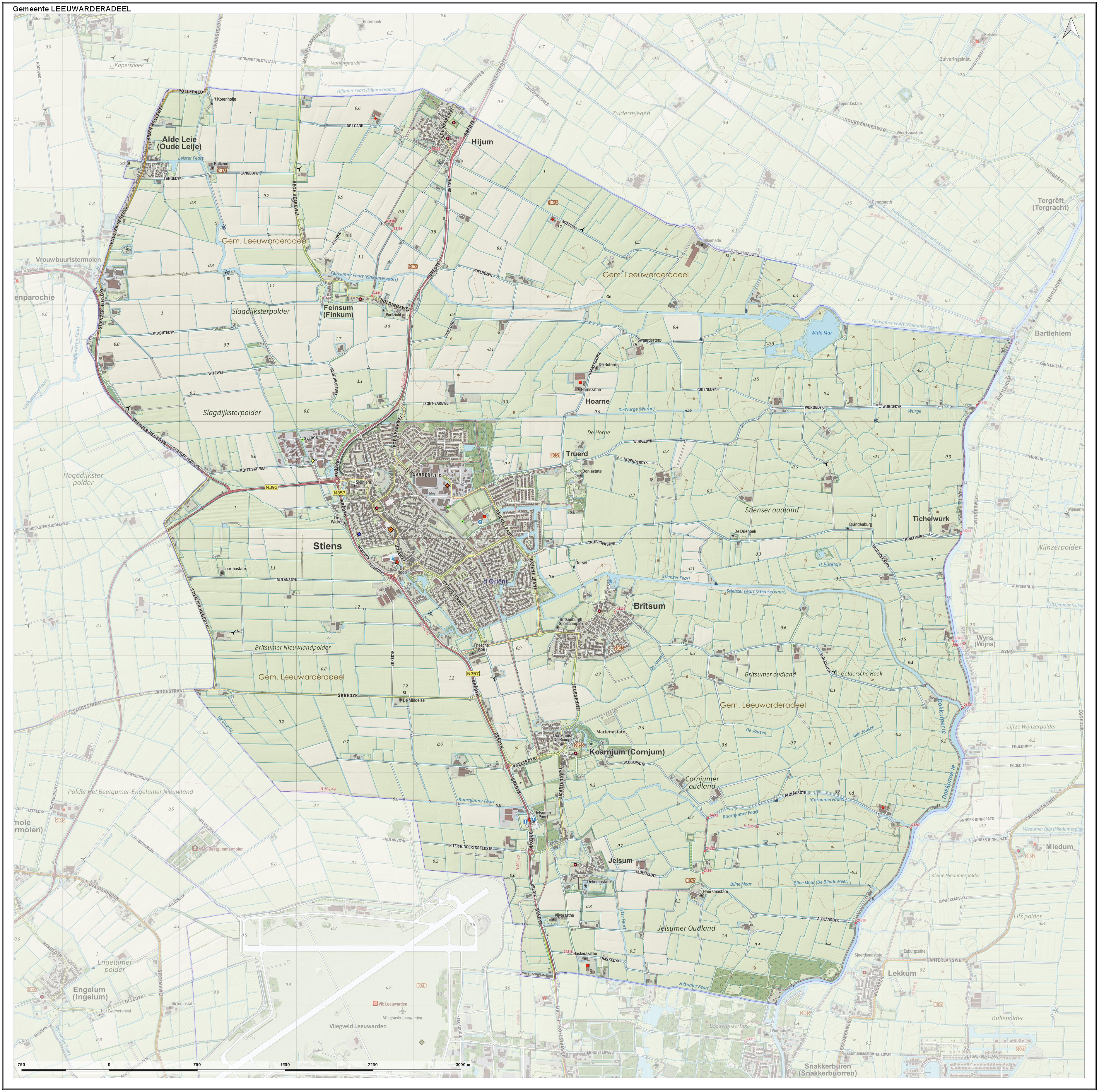 Topografische gemeentekaart. Resolutie: 400 pixels/km. Kaartbeeld samengesteld uit de open geodata van de Top10NL en Top25namen (Kadaster), Creative Commons-BY licentie. Gebouwvlakken uit open geodata BAG extract. Wegen uit de OpenStreetMap, OpenStreetMap community. Reliëfschaduw uit de Actuele Hoogtekaart AHN2. Samenstelling en kleurenschema: Jan-Willem van Aalst, met QGIS. Zie ook de Legenda.